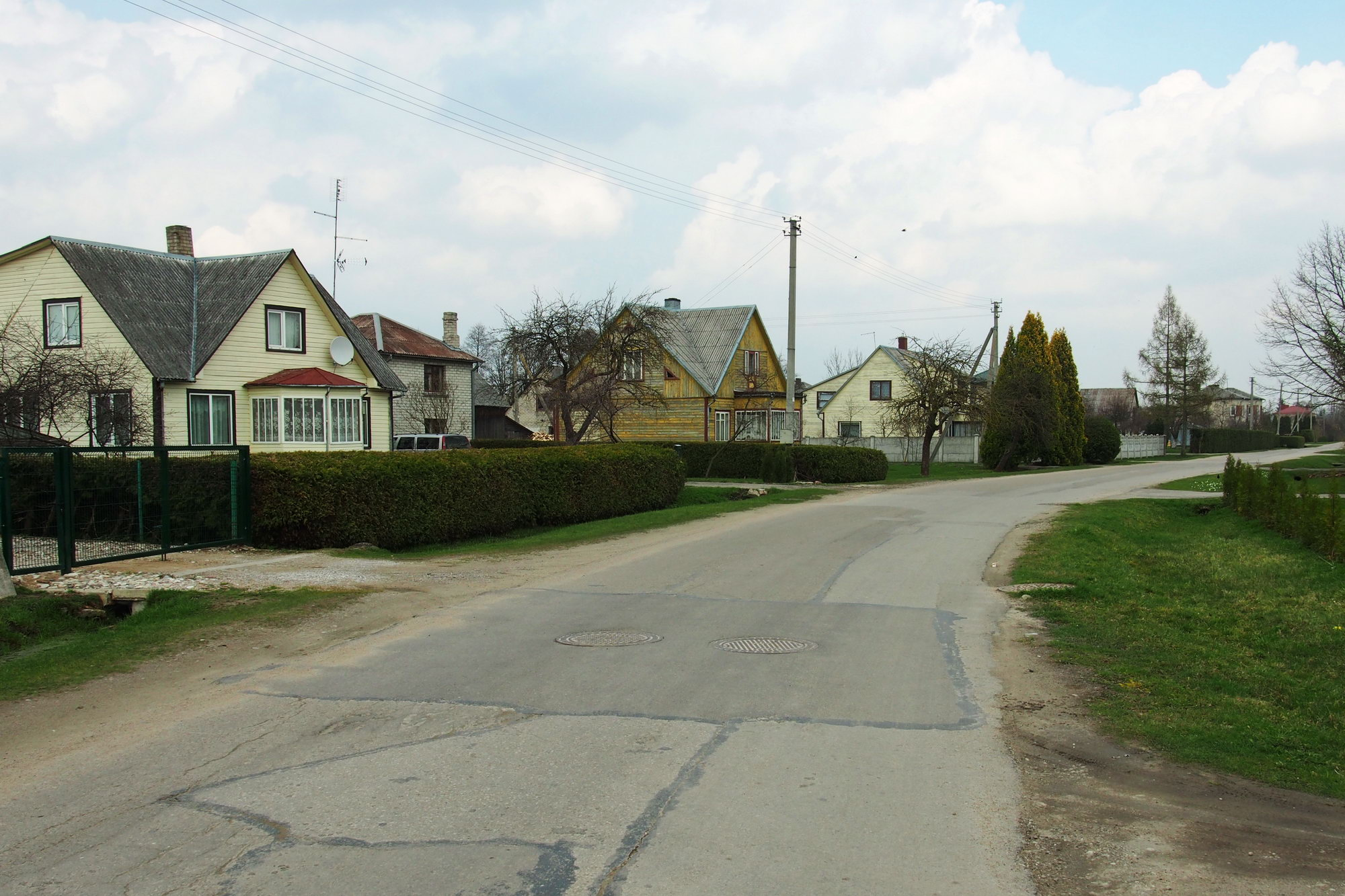 Šakių r. Giedručių kaimo Giedručių gatvė